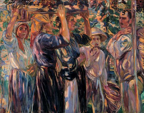 Weinernte, Öl auf Leinwand; 138 x 174 cm; Collection: Stiftung Stadtmuseum Berlin